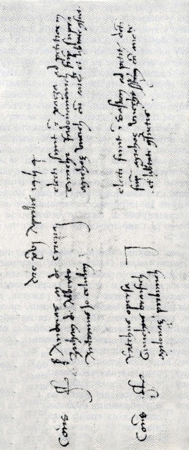 Први запис Заслон, Дубровачки архив, 1454. год.